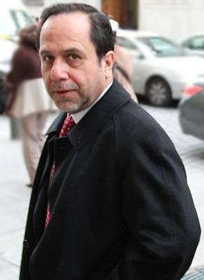 Ramiro Mendoza Zúñiga, contralor general de la República de Chile.